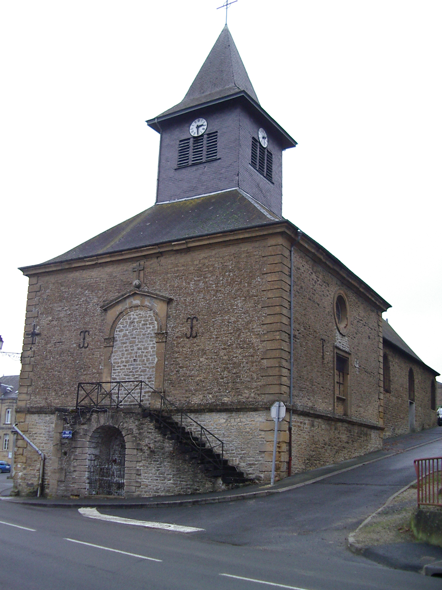 La Grandville- Eglise Saint-Nicolas- Ancienne entrée (colmatée)